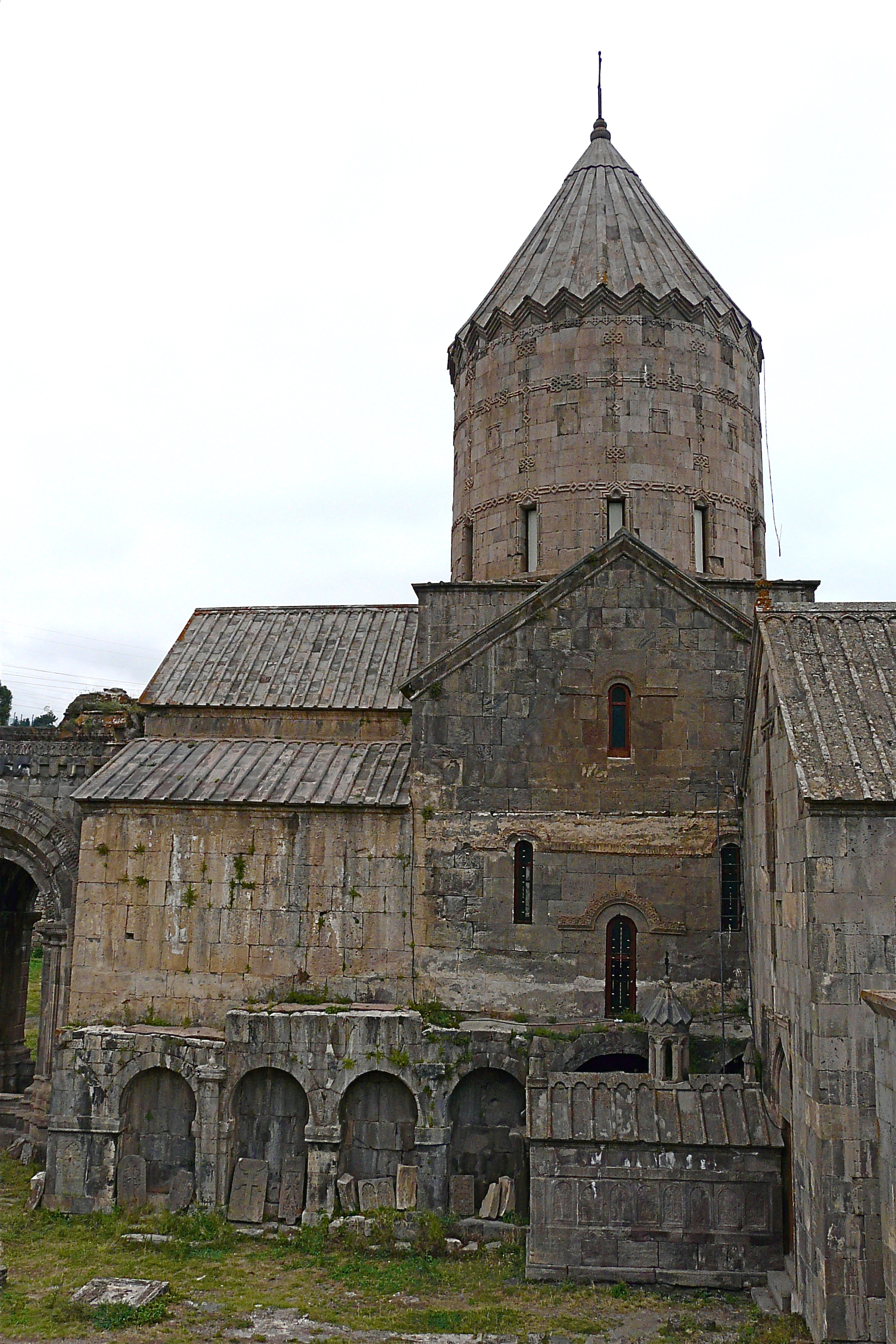 Waar de Vorotan-rivier zich een weg zoekt door het zachte gesteente tussen de dichte wouden bevindt zich het klooster van Tatev. Op een grote vooruitspringende rots en met een wijds zicht op de oprukkende bergen en het dal begon men reeds in de 9de eeuw met de bouw van dit klooster. Dit werd later beroemd als een voorname universiteit en het spirituele en politieke centrum van Sjunikh. Het was de bisschopszetel en gedurende duizend jaar het levendigste klooster van Armenië. The monastery of Tatev (Armenian : Տաթեվ